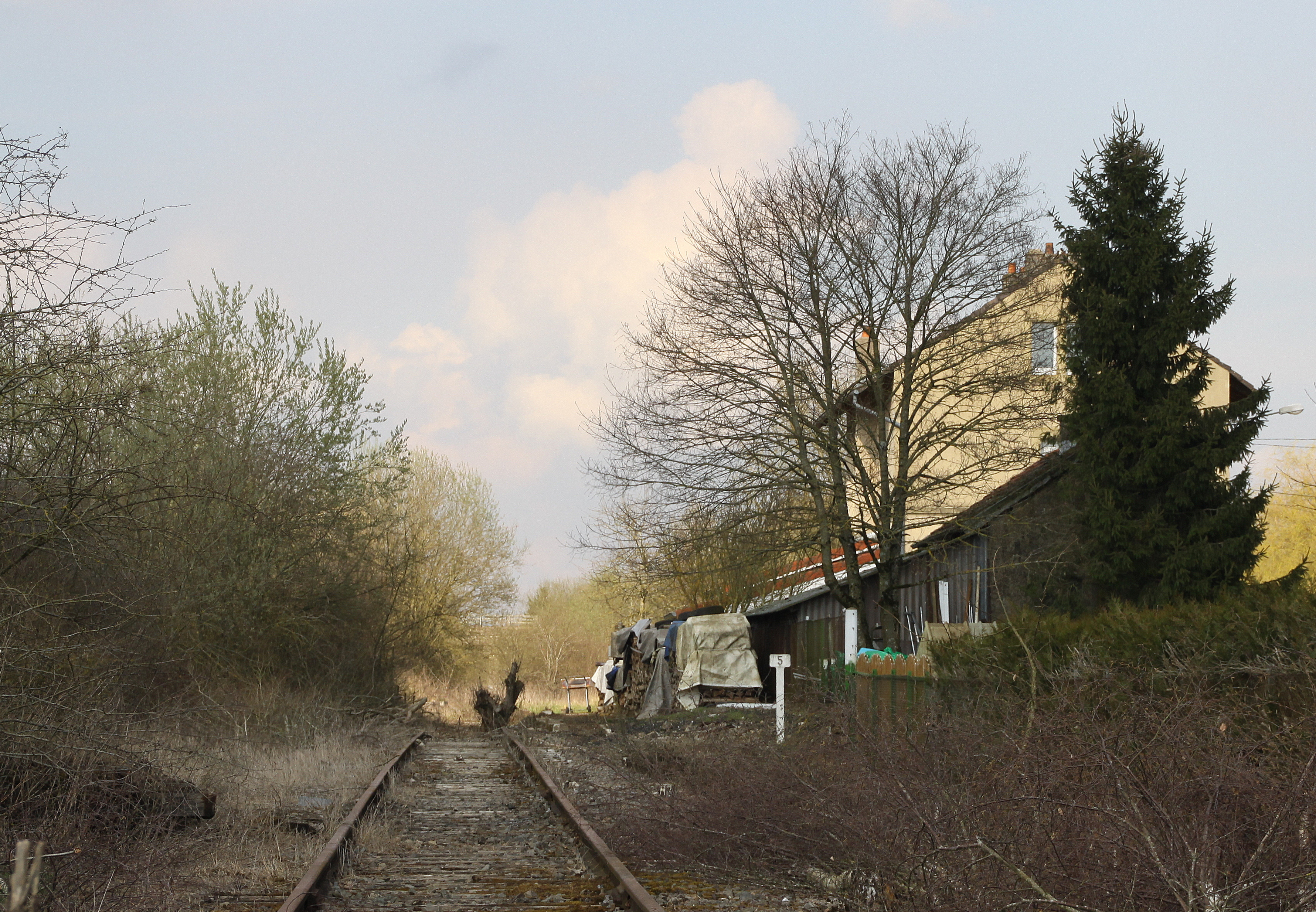 D'Gare vu Boulange 2014